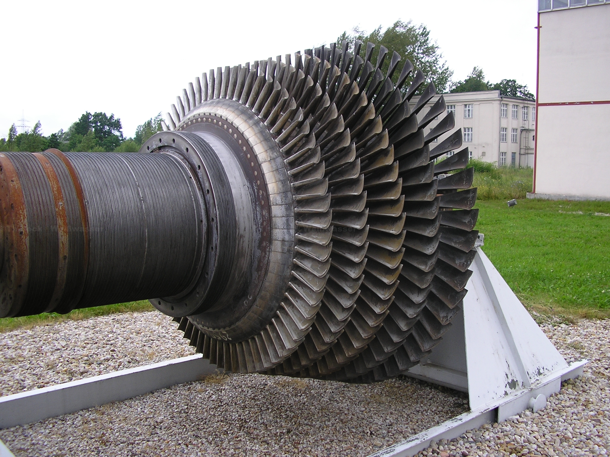 Turbinenläufer einer Gasturbine vom Typ G24